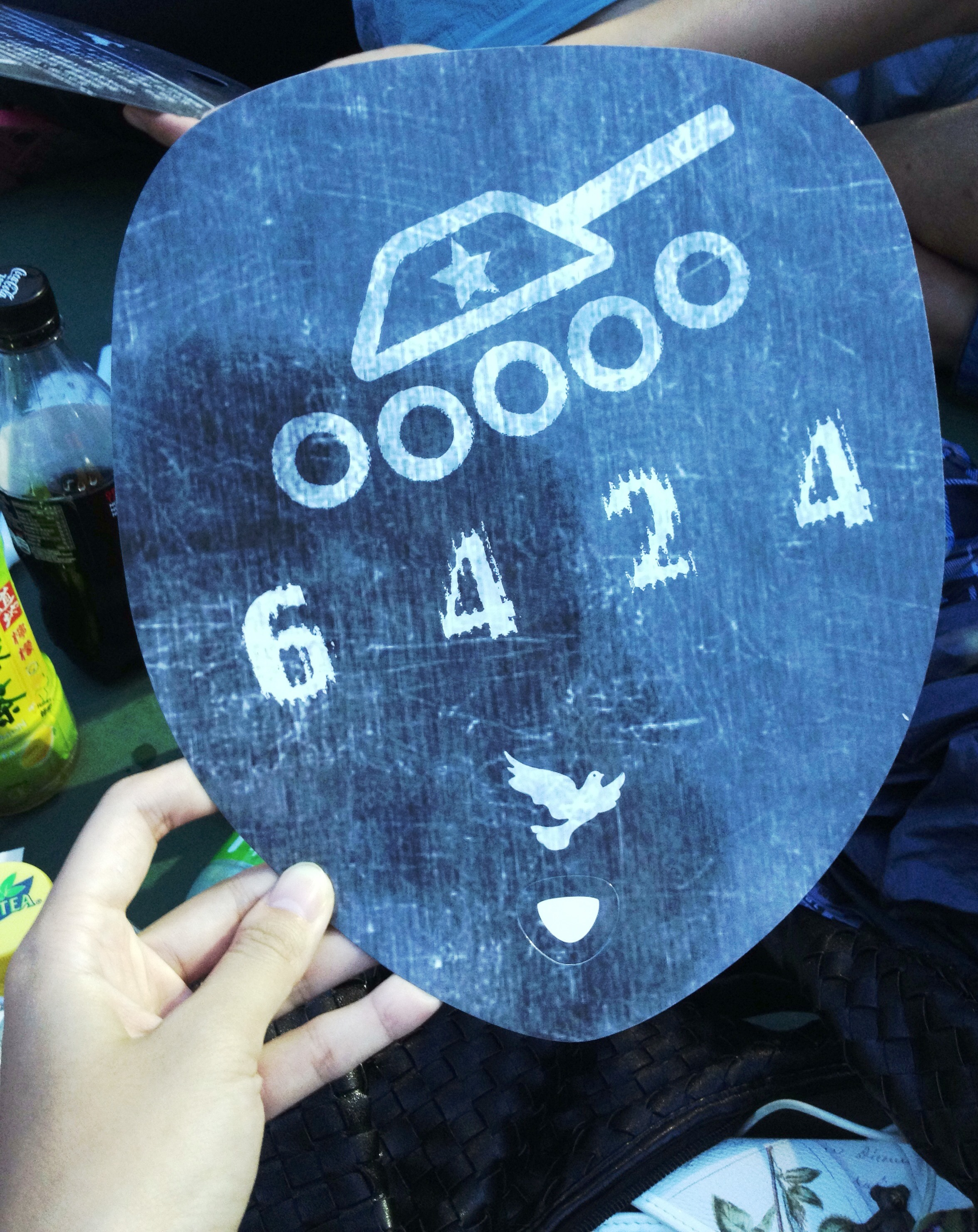 Braemar Hill, 港島, 香港